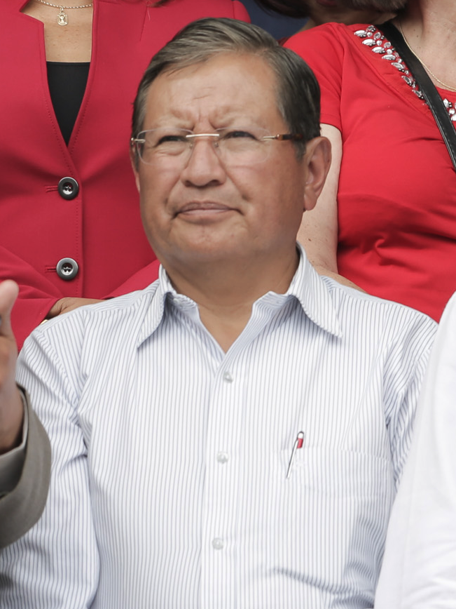 Mariano Curicama en 2017